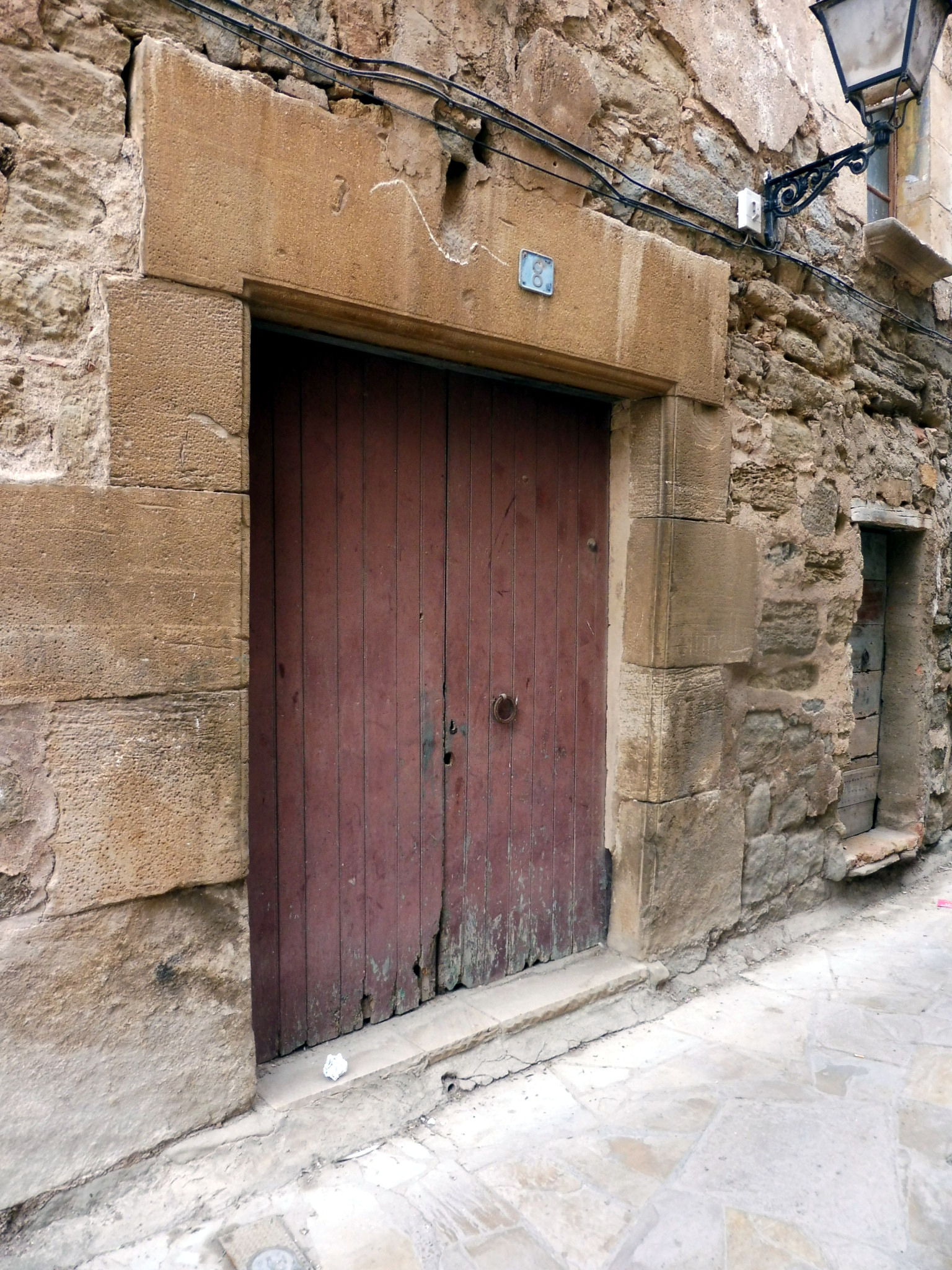 Habitatge al carrer Portal, 8 (la Fuliola): portada